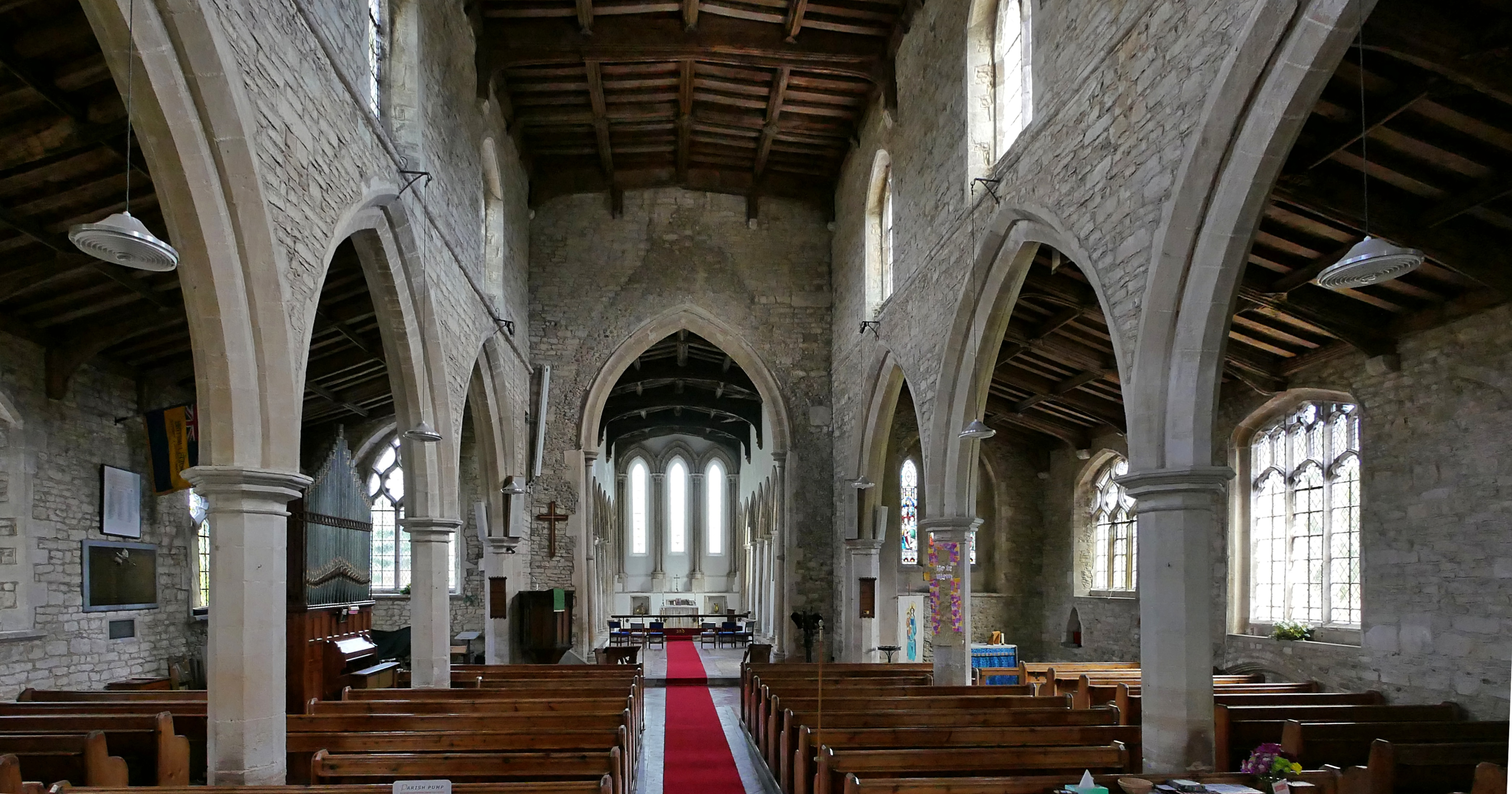 St Peter and St Paul's church, Alconbury, nave from the west